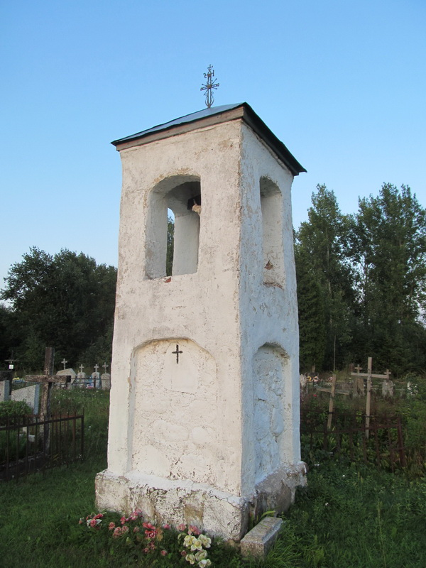 Вайнікішкі. Капліца на могілках